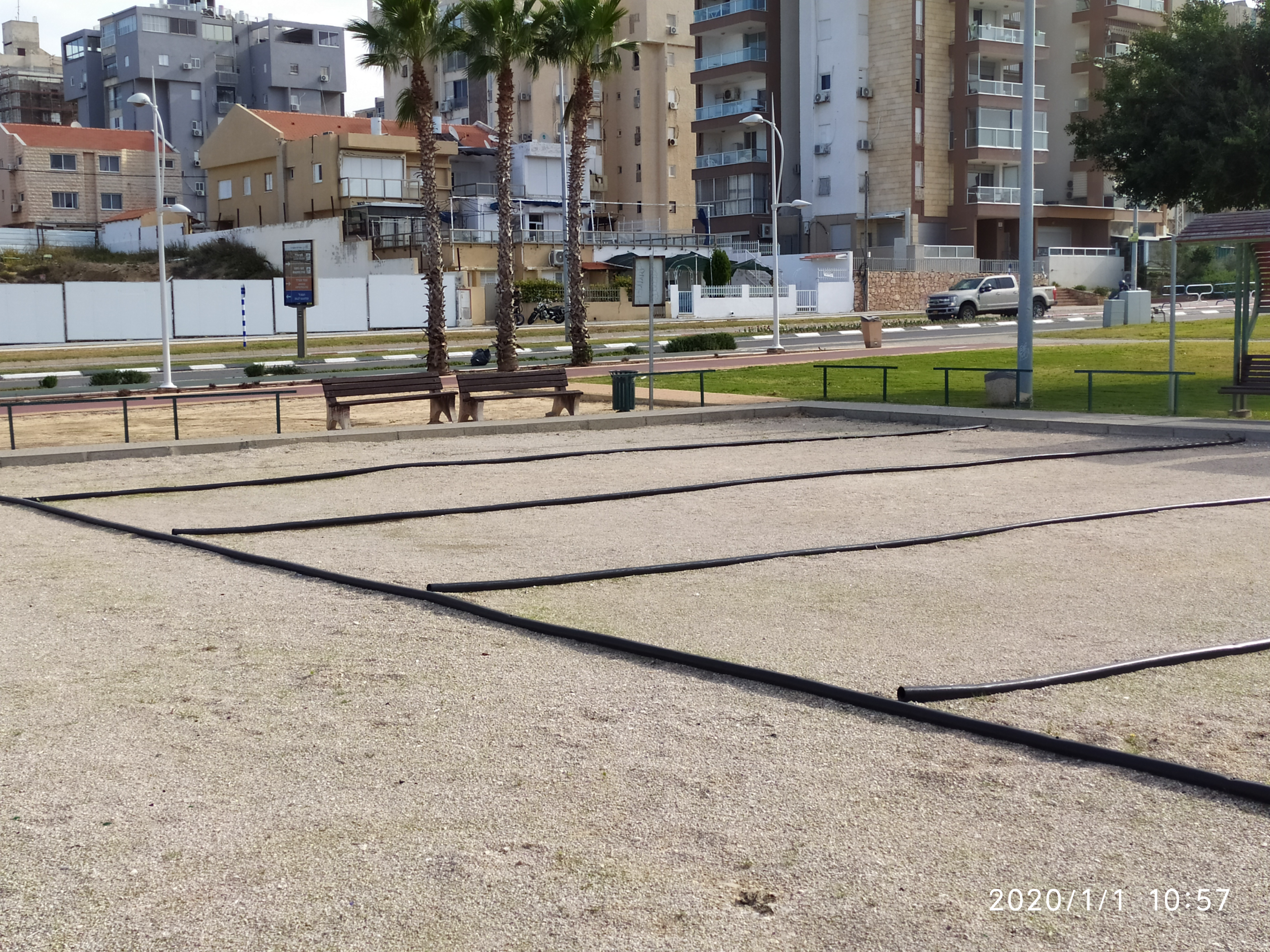 מגרש פטאנק, משטח חצץ, אשדוד